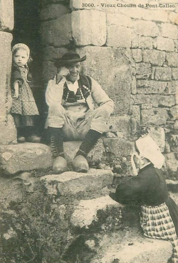 Vieux paysan de Berné dans le Morbihan vêtu comme les anciens chouans prenant la pose assis sur le perron d'une porte en compagnie d' une femme et une fillette.